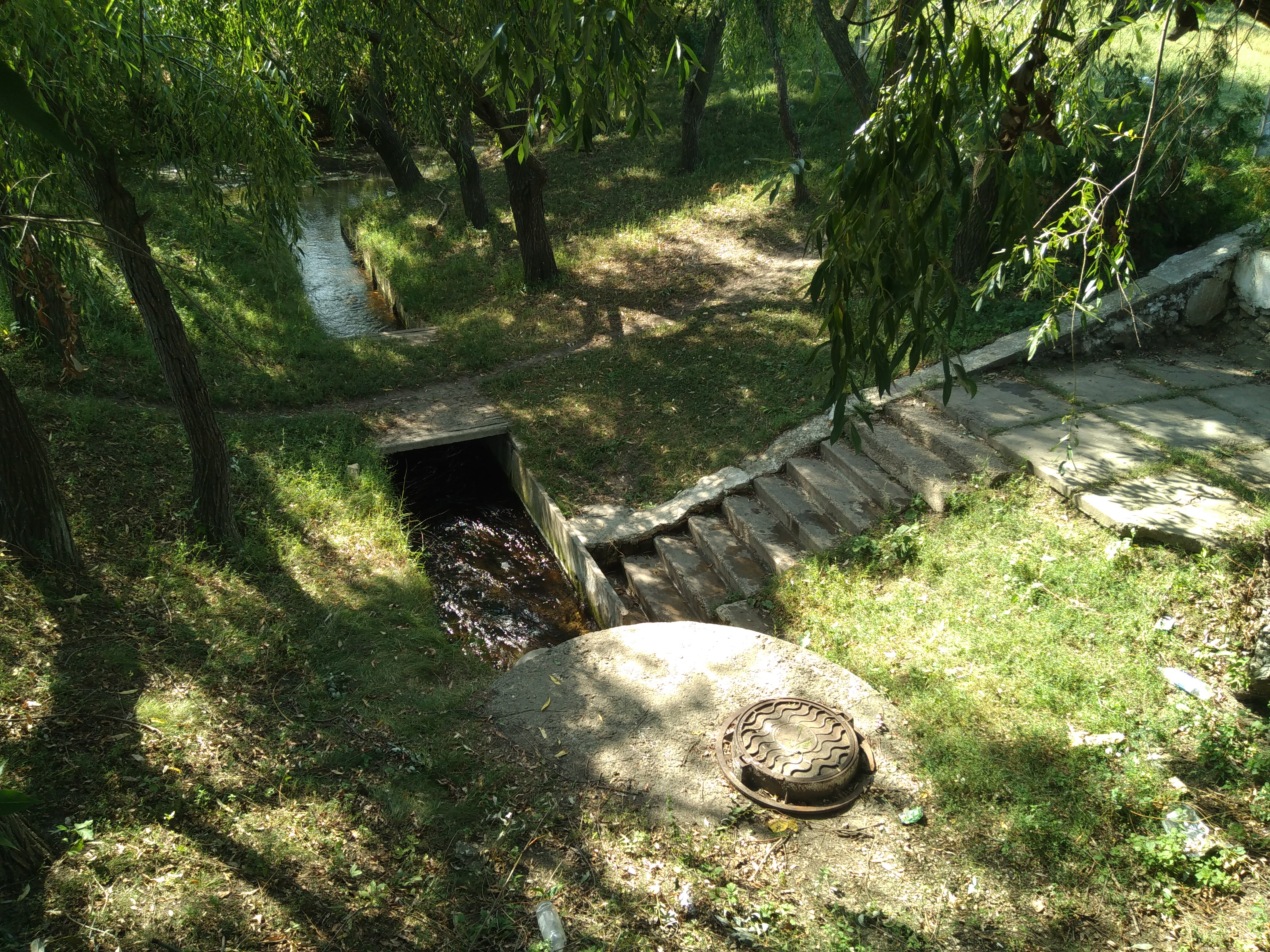 Izvorul din satul Cucuruzeni, monument al naturii amplasat în raionul Orhei, pe malul drept al râului Cogîlnic (cod MD-OR-mn.B-017) B-017